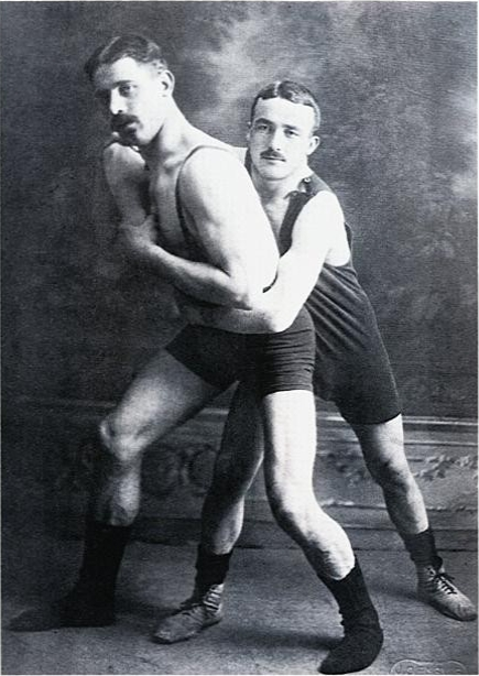 Ansgard Løvold (left) wrestling